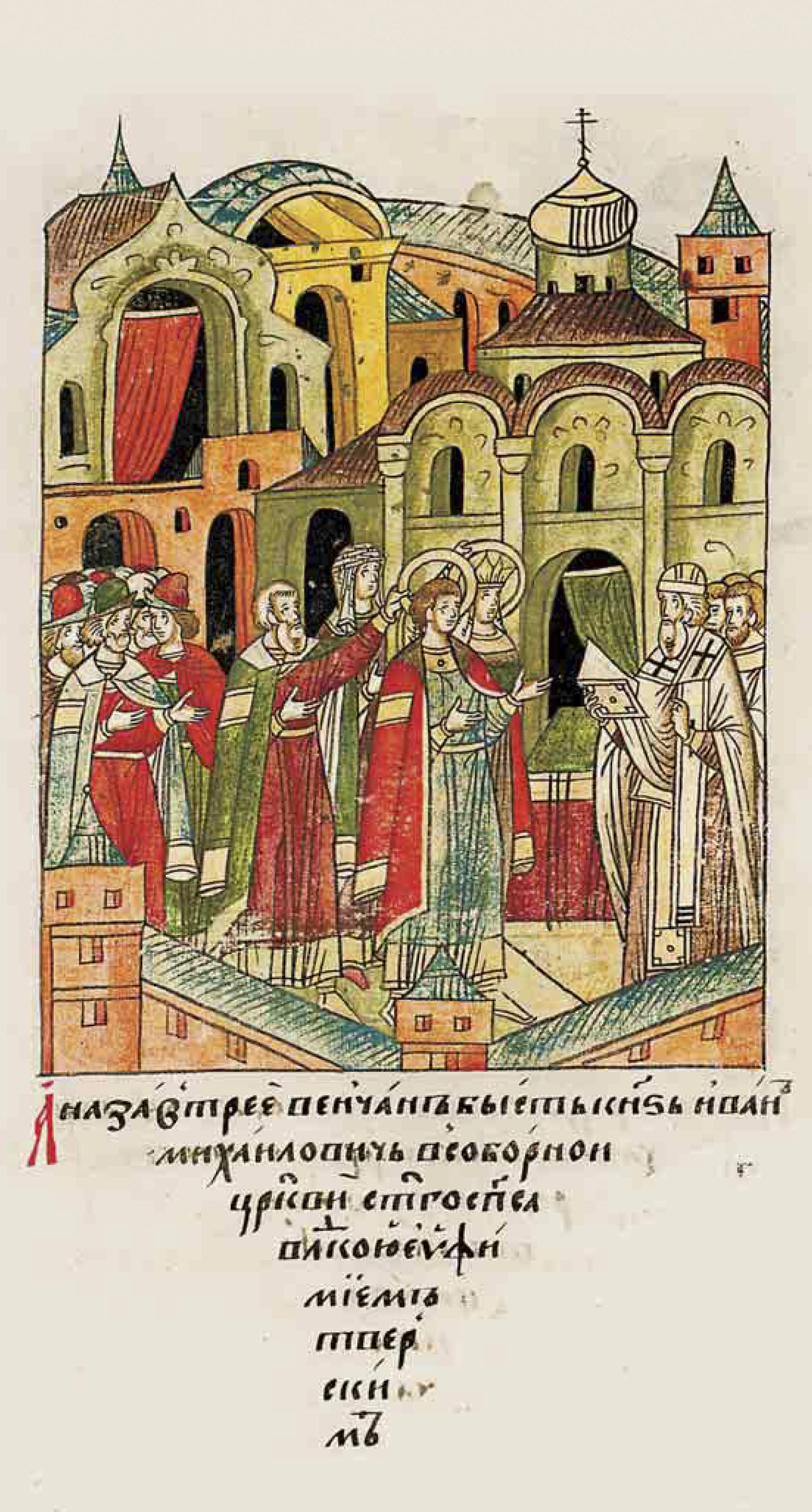 ЛИЦЕВОЙ ЛЕТОПИСНЫЙ СВОД А на следующий день обвенчан был князь Иван Михайлович в соборной церкви святого Спаса владыкою Евфимием Тверским.